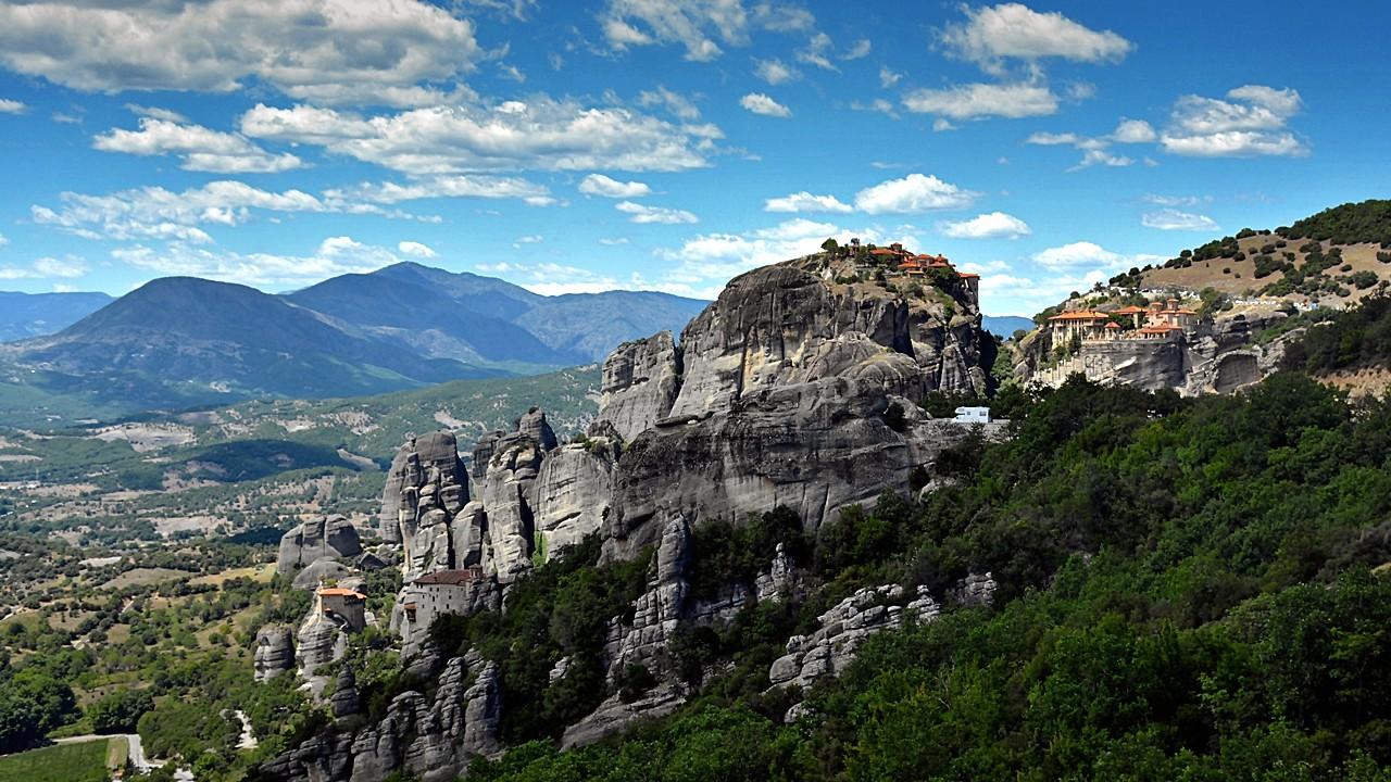 Μετέωρα (συνολικά)«Μετέωρα»